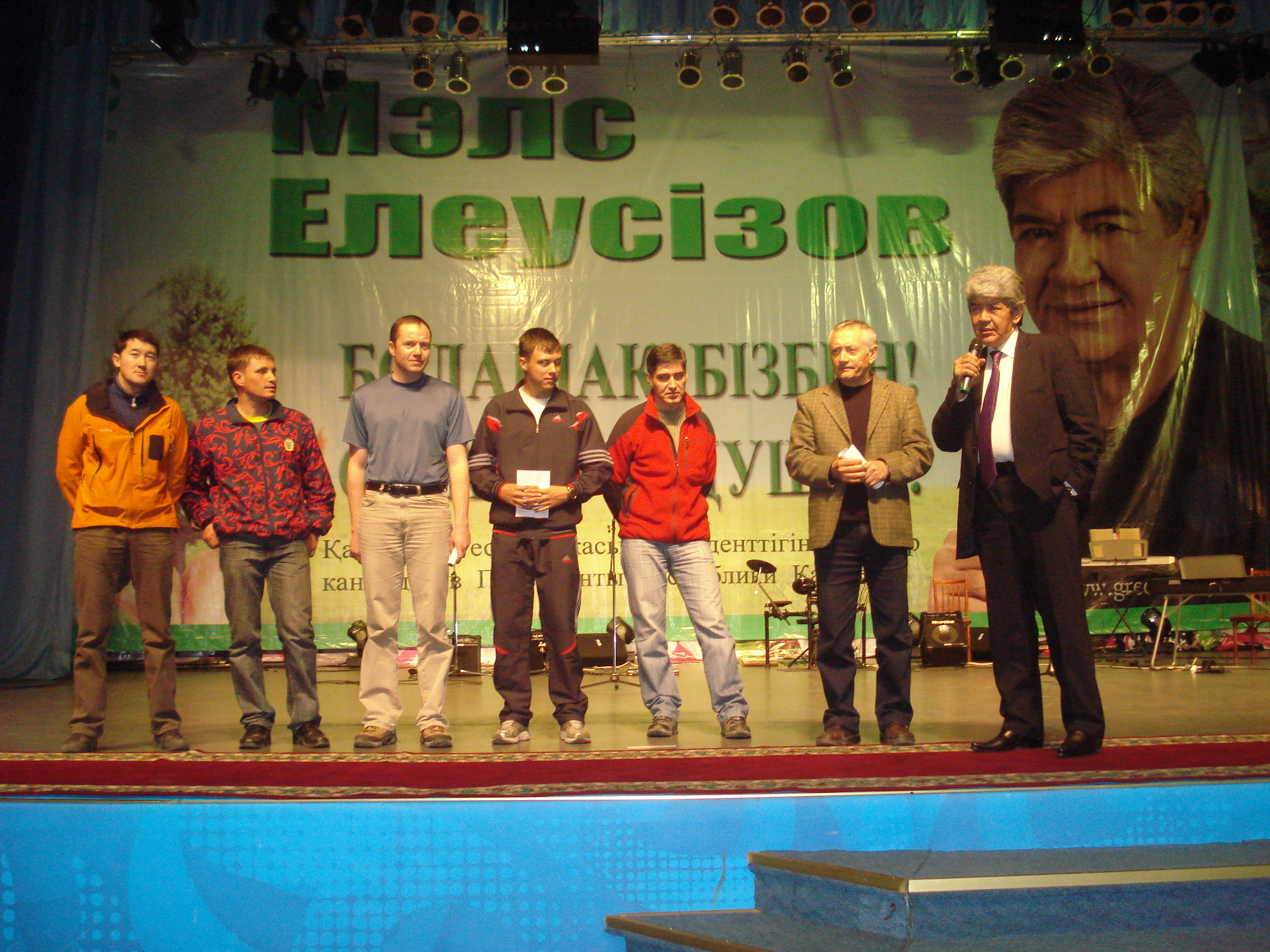 Мэлс Елеусизов (справа) и сборная Казахстана по альпинизму на встрече Елеусизова с избирателями 1 апреля 2011 года.